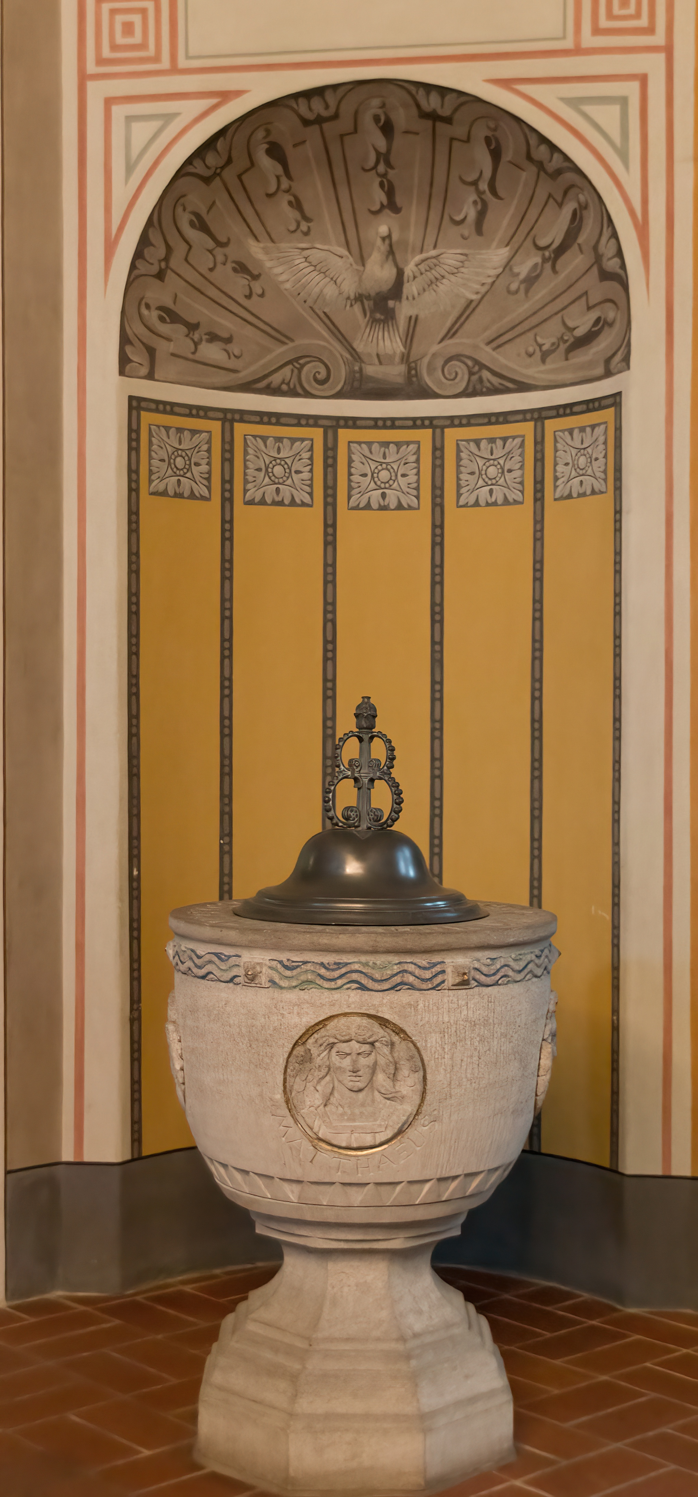 Dorfkirche Hohen Neuendorf Taufnische und Taufbecken